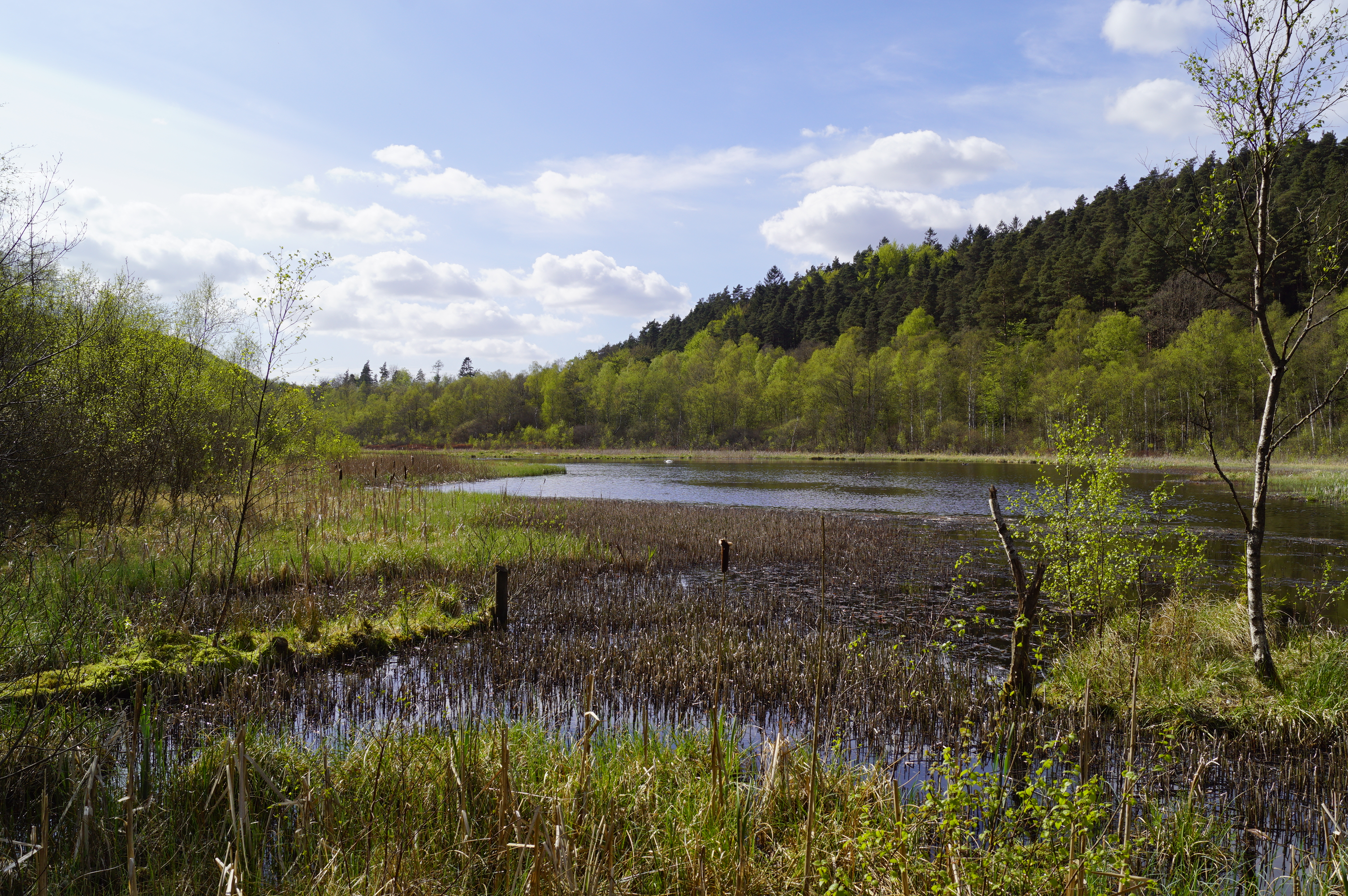 Jenskær Sø set mod vest